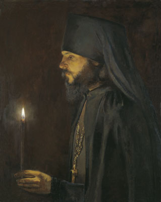 Monah